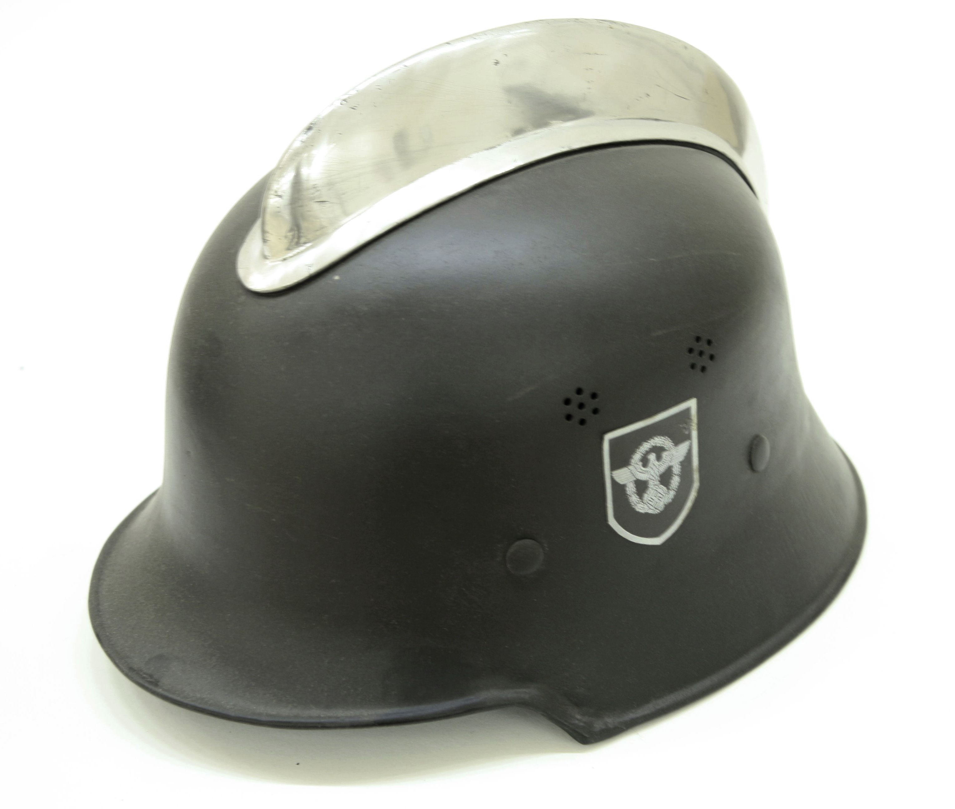 Helm der Feuerpolizei in Wien 1939-1945 im Feuerwehrmuseum Perchtoldsdorf in Niederösterreich